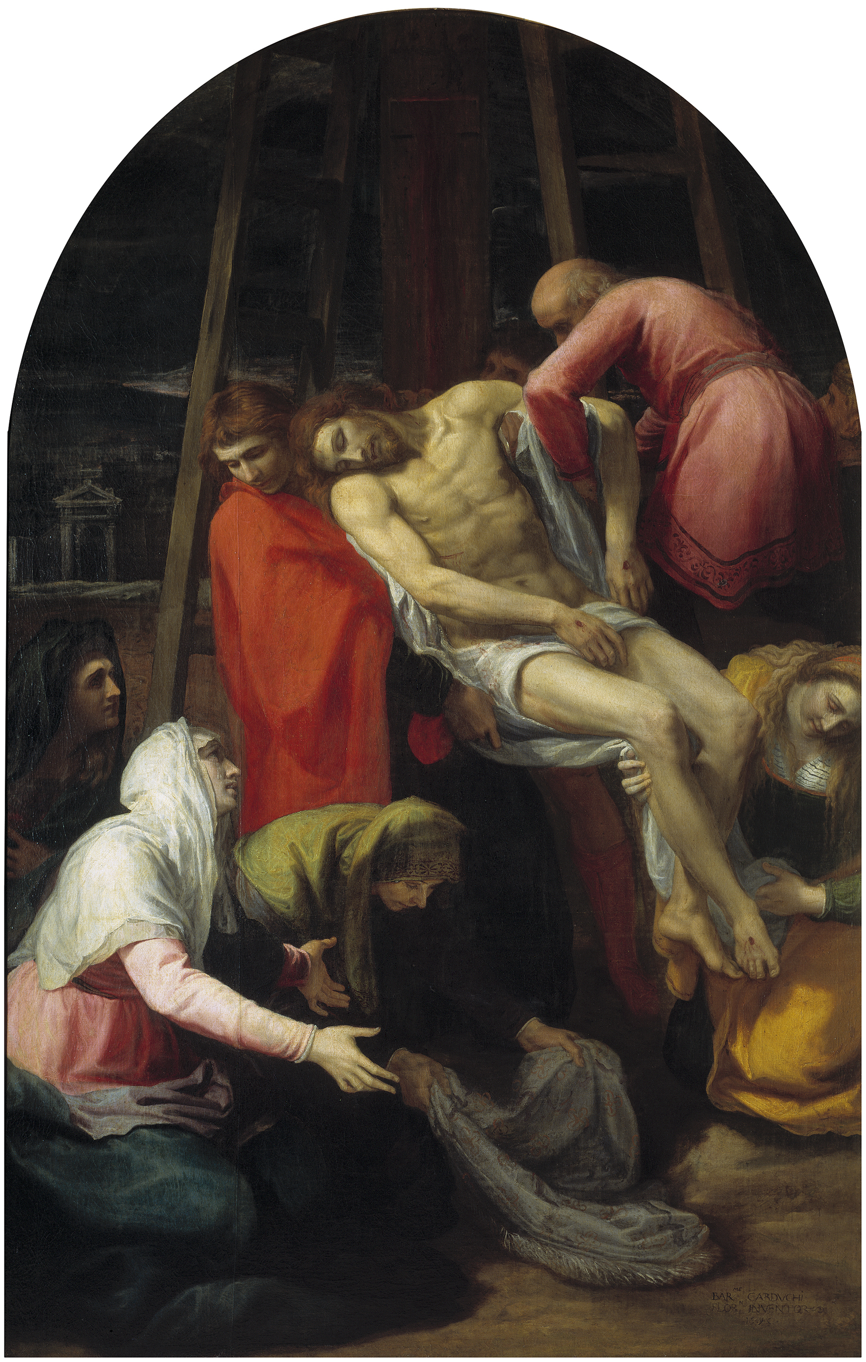 La obra representa el momento en que Jesucristo fue descoolgado de la cruz, y es una de las obras de Bartolomé Carducho que se conservan en el Museo del Prado.